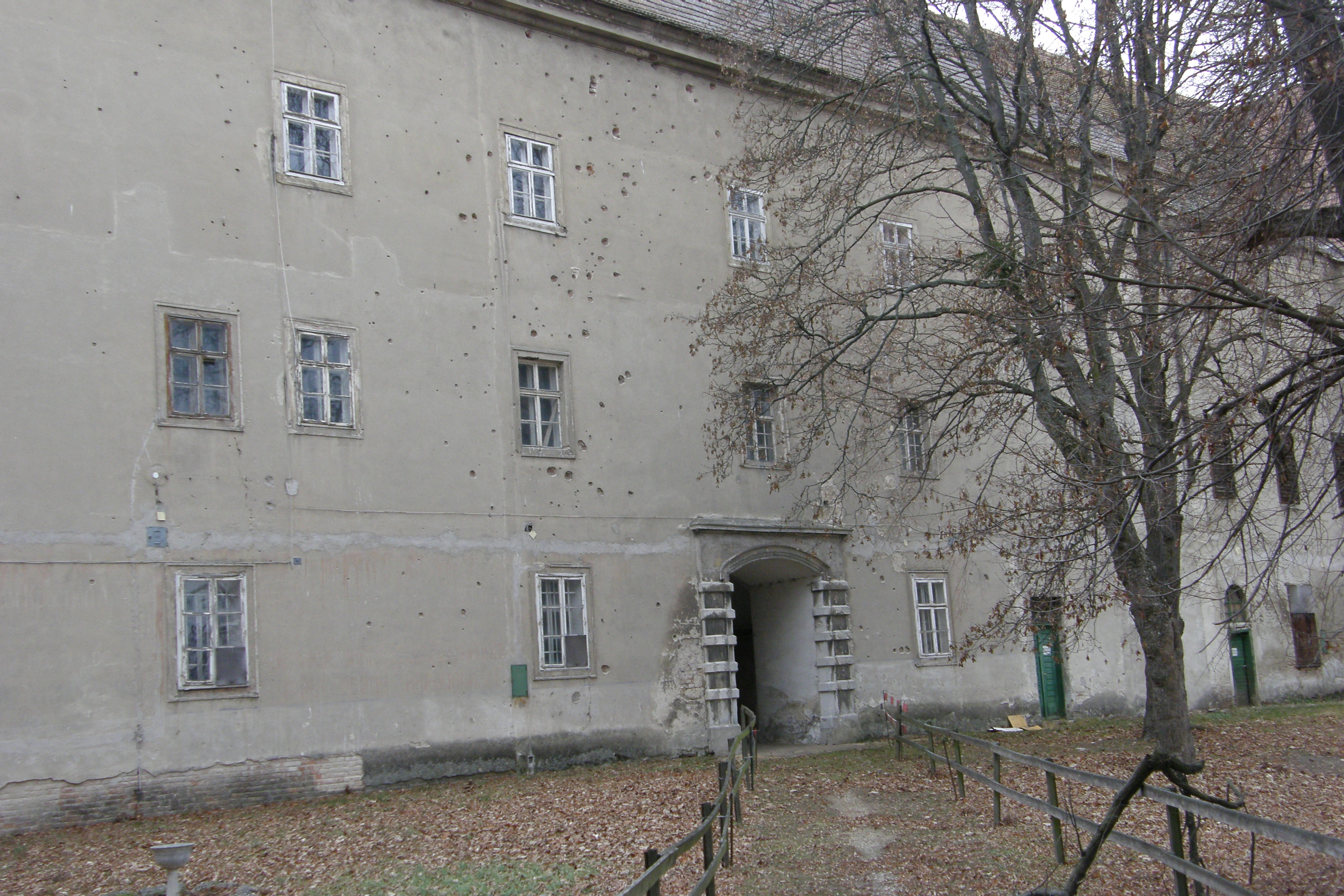 Schloss Rabensburg, 1. Hof, mittlere Flügel